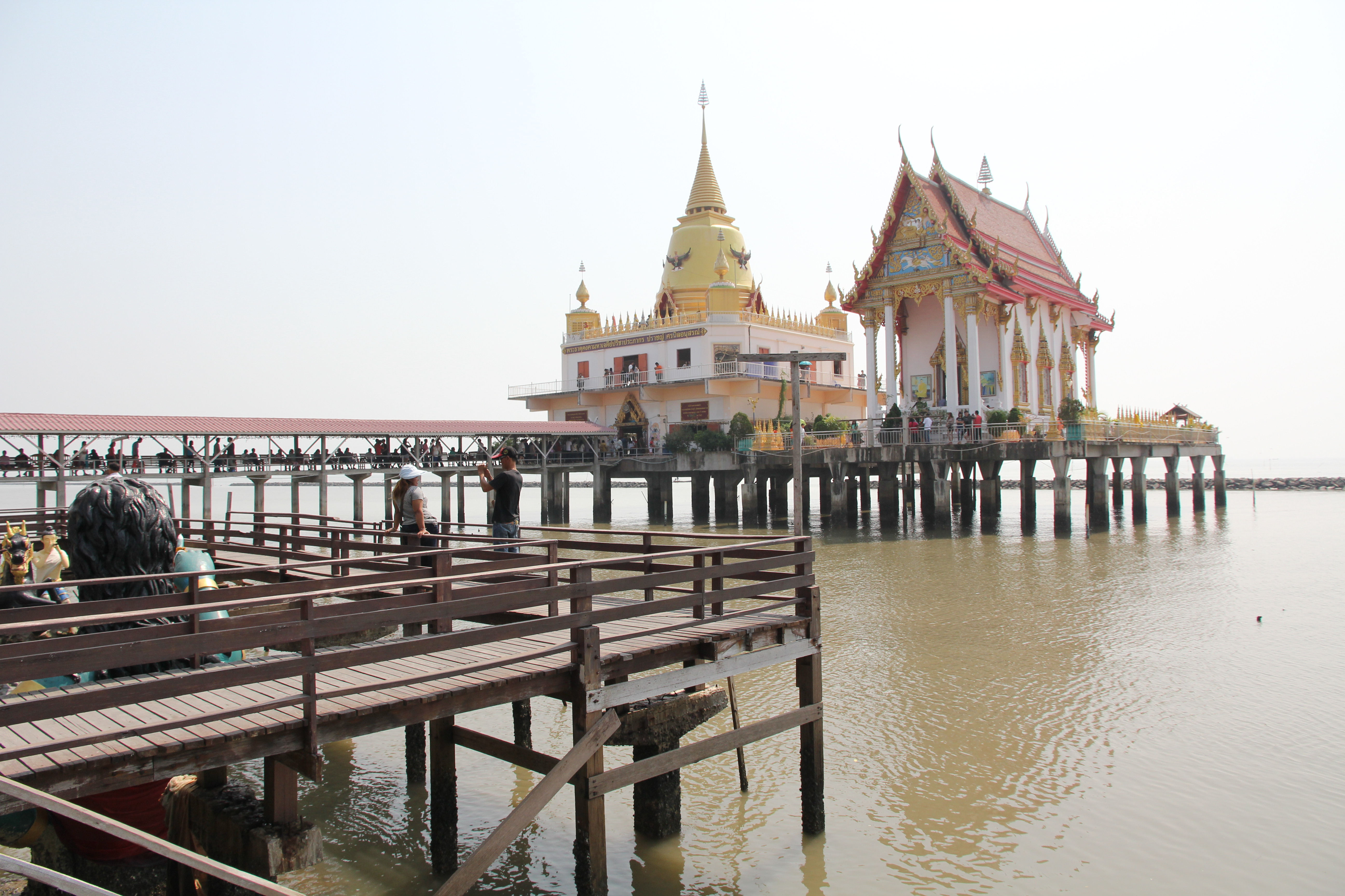 วัดหงษ์ทอง